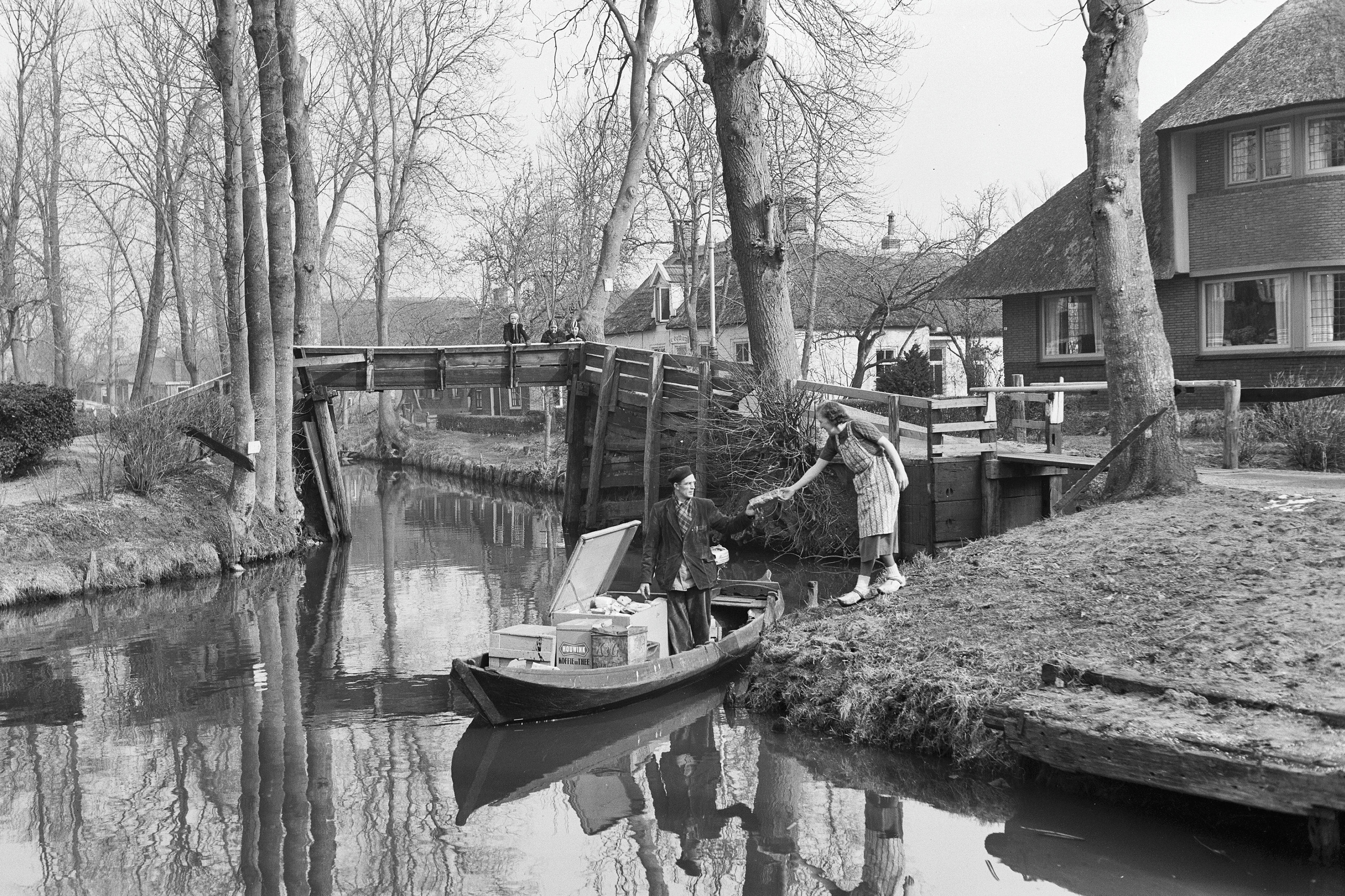 Gracht: De varende kruidenier in de Giethoornse gracht aan het werk (opmerking: Afgeleverd op het FTA in 2007, uit het archief van de fotograaf) This is a possible Rijksmonument: Find the monument in the Monuments database: in Giethoorn All Rijksmonumenten in Giethoorn Is this a Rijksmonument? Yes No More information about this project and help. More images to work at in Category:Possible Rijksmonumenten.